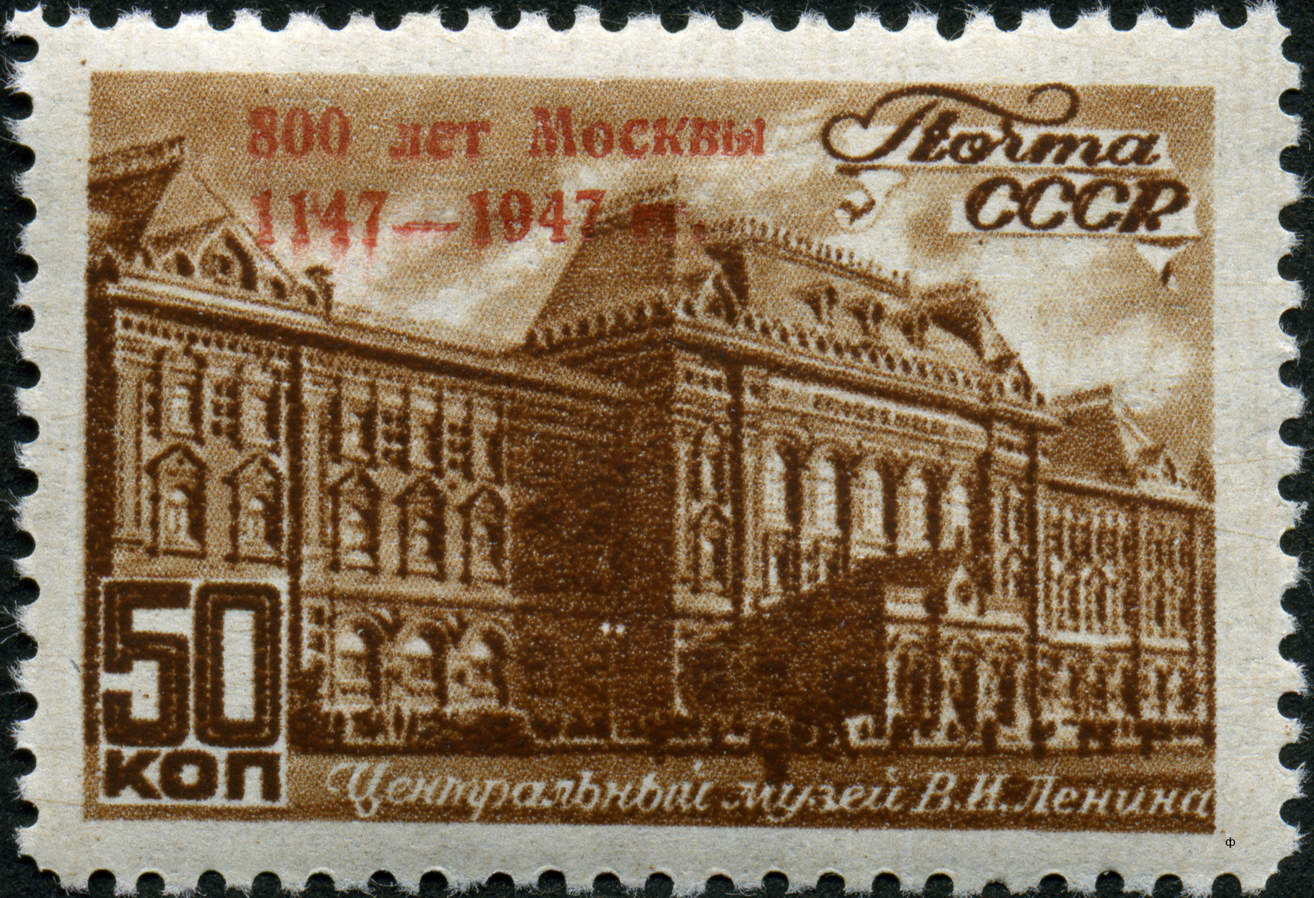 Марка СССР